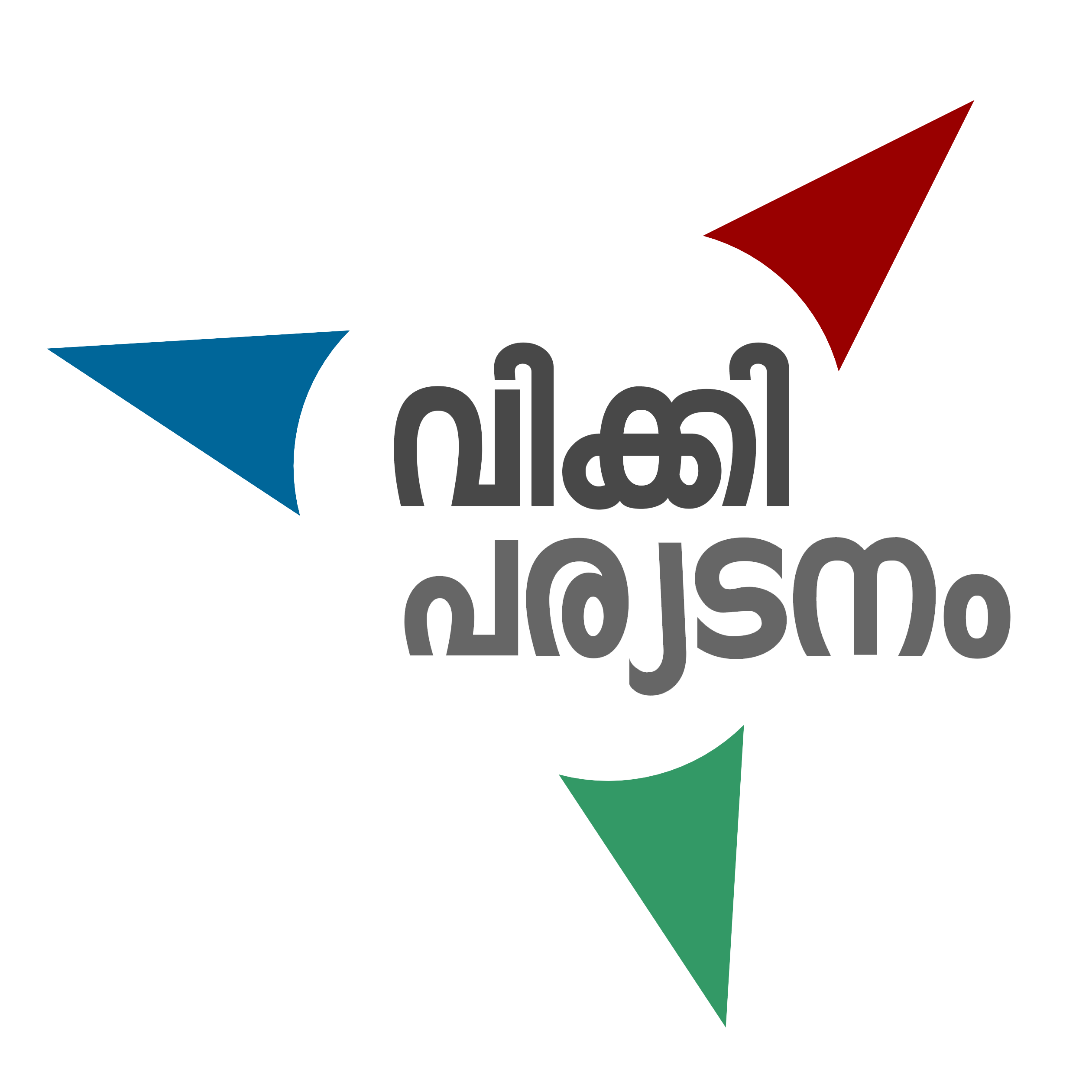 വിക്കിപര്യടനം എന്ന പ്രോജക്റ്റിന്റെ ലോഗോ